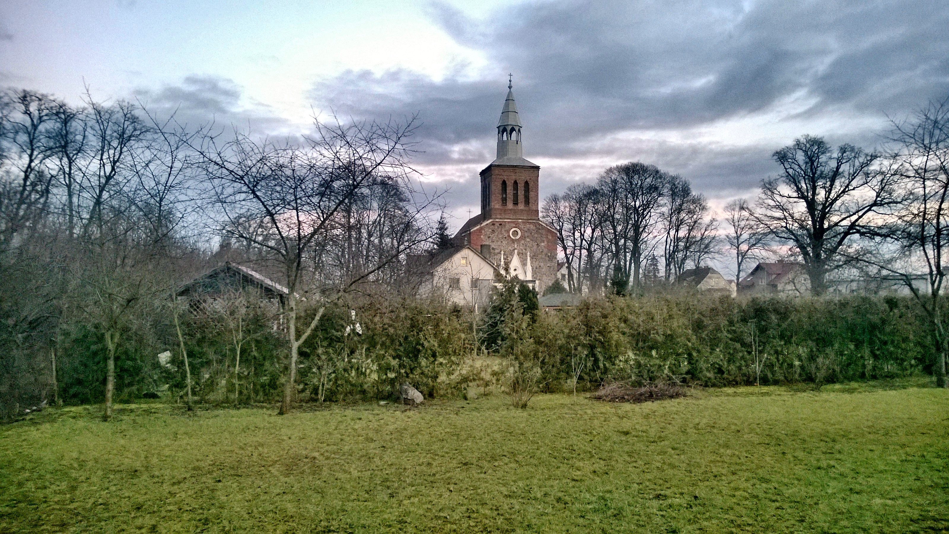 Czelin, Poland